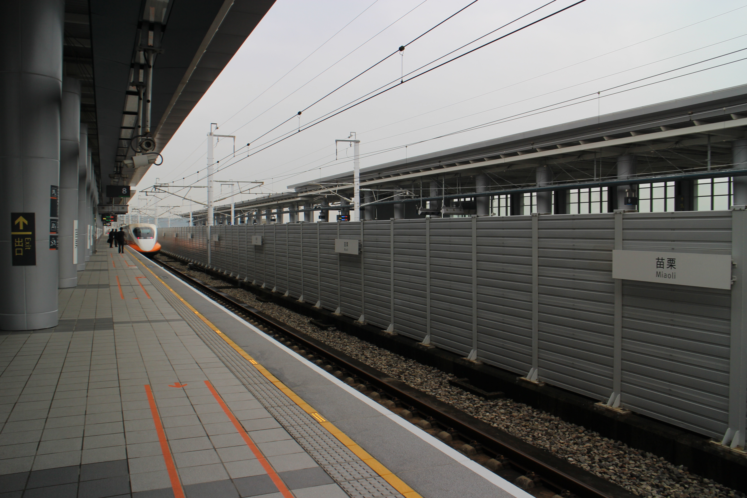 台湾高速鉄道苗栗駅月台